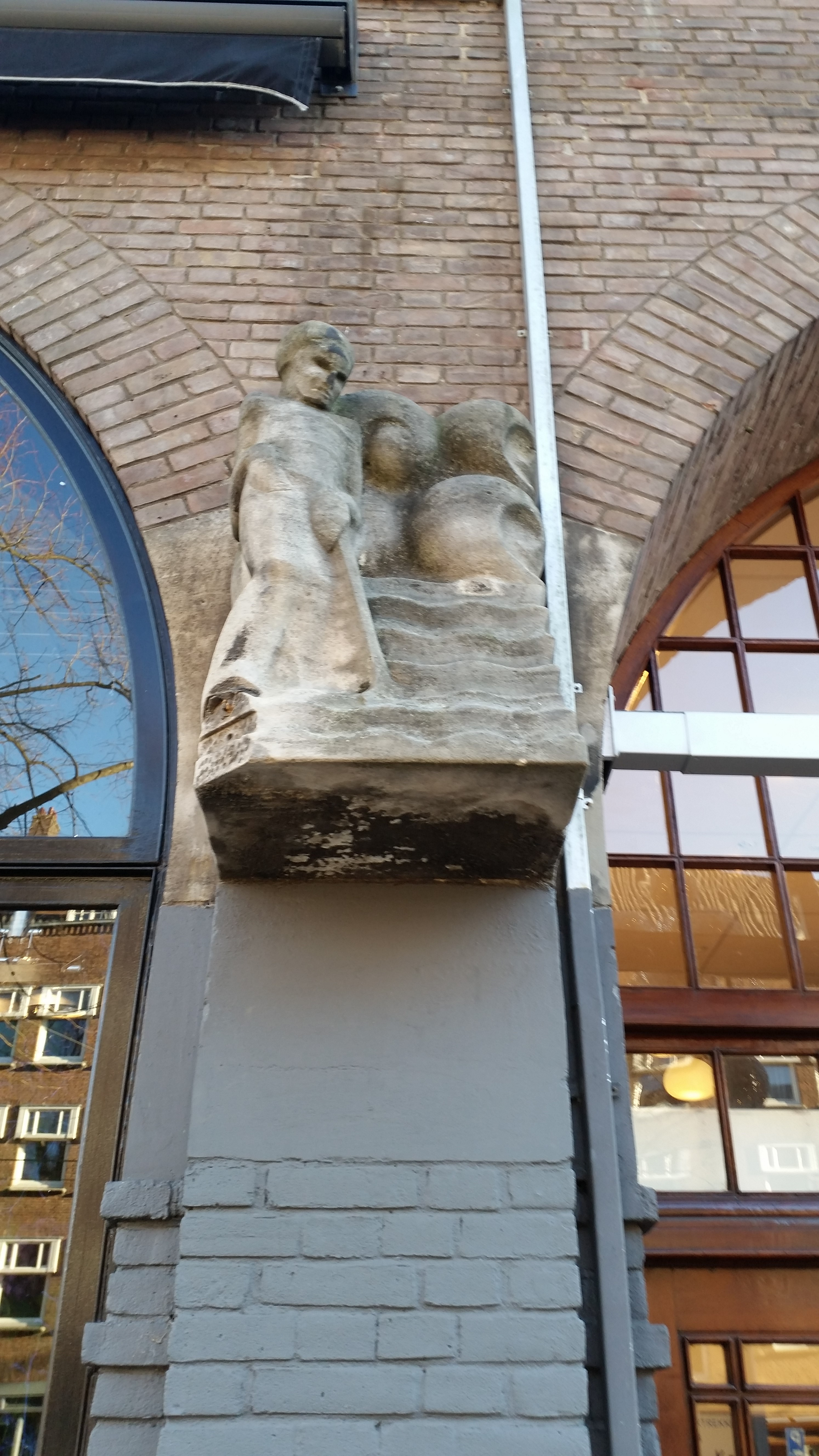 Gevelbeeld aan Beethovenstraat 11-27, Amsterdam